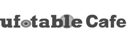 ufotable cafe